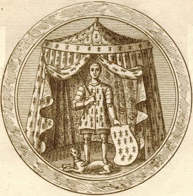 Sceau de Jean V de Bretagne, duc de Bretagne